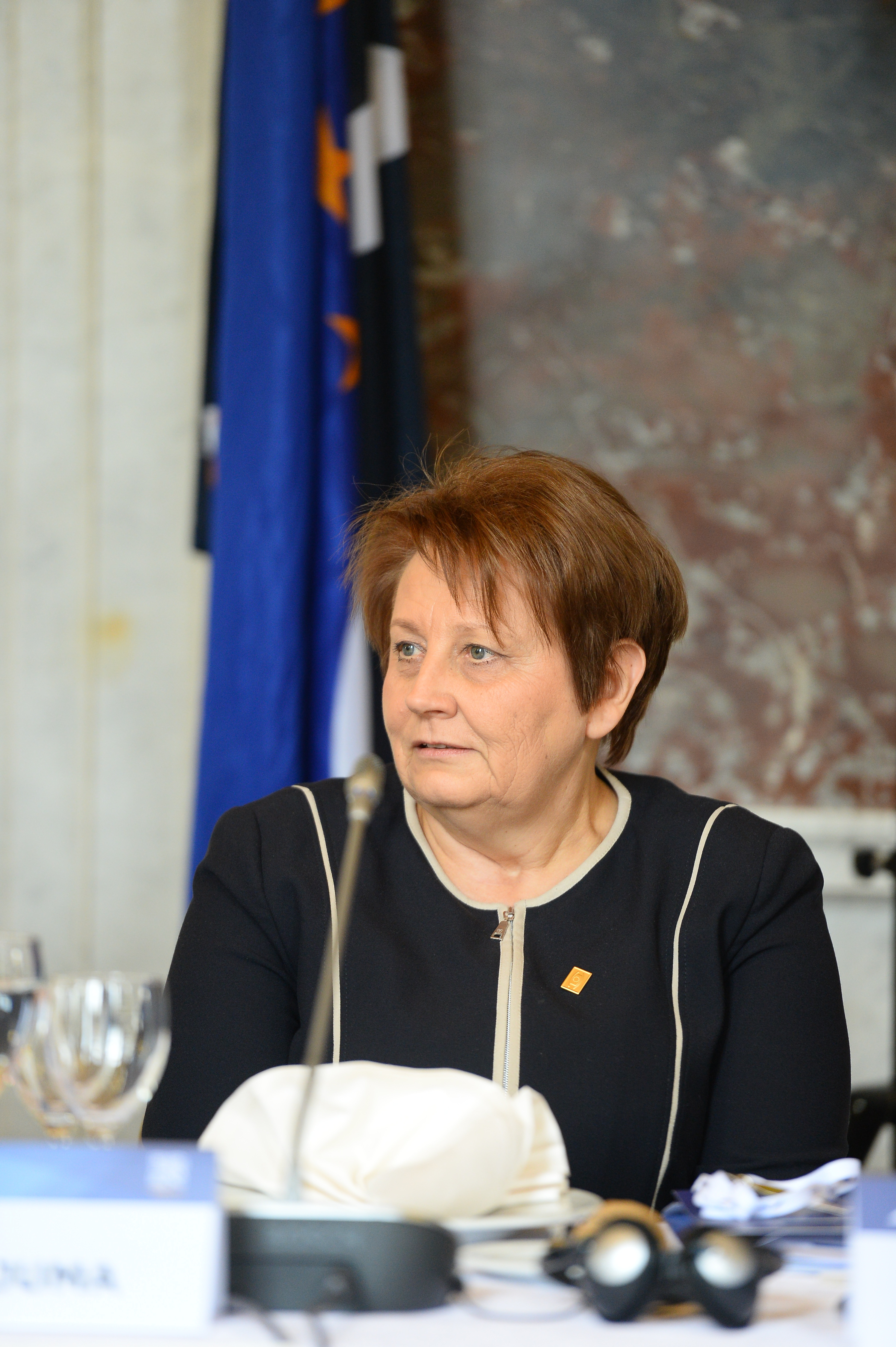 EPP Summit, Brussels; October 2014